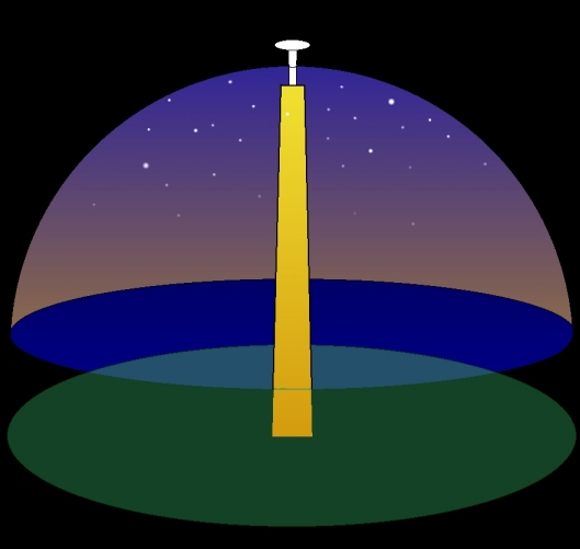 Kuvassa näkyy, miten pohjannaula on kiinni maailmanpylväässä ja taivaankannessa. Maailmanpylvään kanta lepää keskellä kiekkomaista maanpintaa. Piirretty E.N Setälän Sammon salaisuus-kirjassa (1932) olevien kuvien perusteella Käyttäjä:Tuohirulla